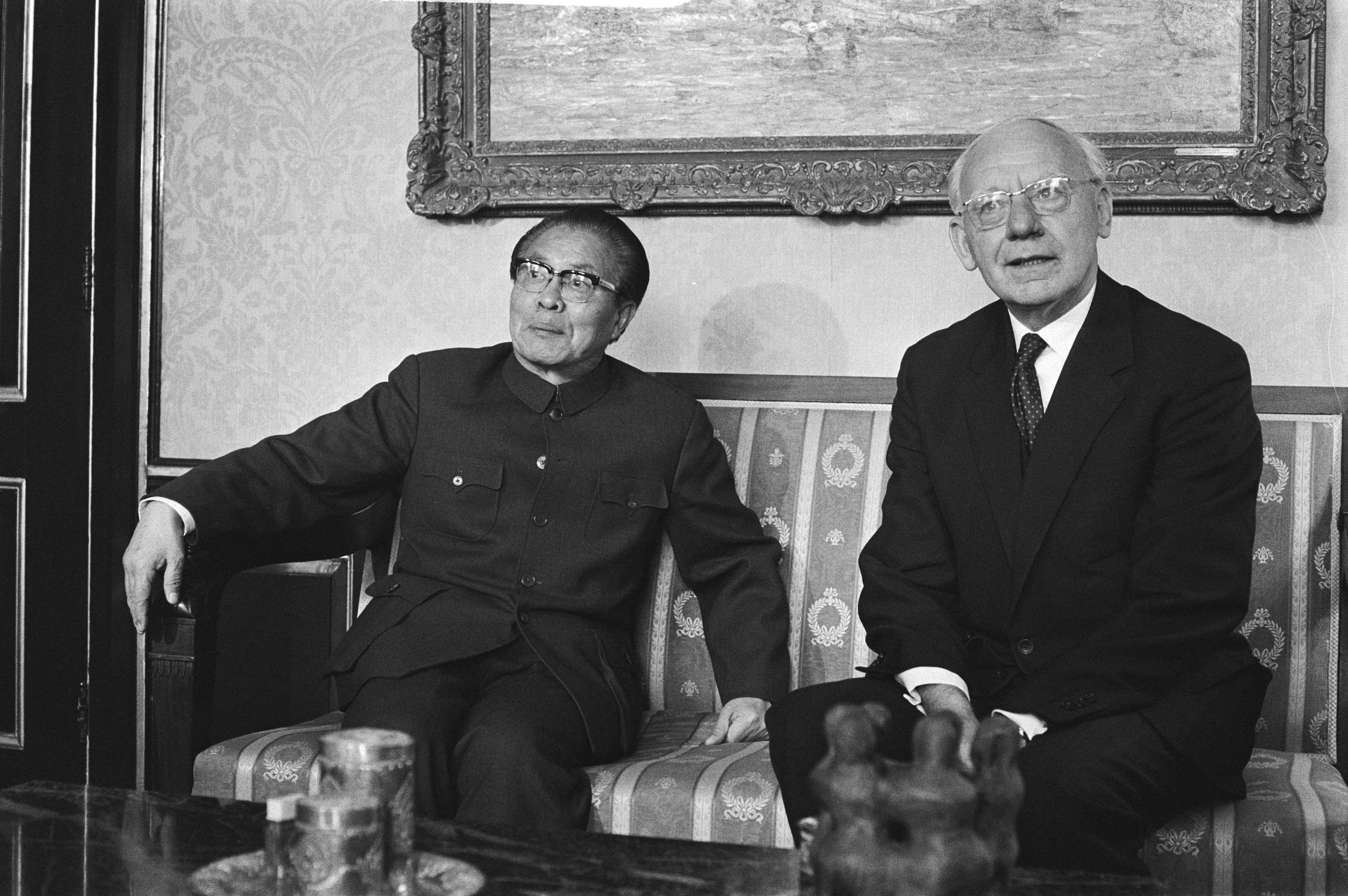 Collectie / Archief : Fotocollectie Anefo Reportage / Serie : [ onbekend ] Beschrijving : Huang Hua (l) met Vondeling Datum : 8 juni 1978 Trefwoorden : ministers Fotograaf : Suyk, Koen / Anefo Auteursrechthebbende : Nationaal Archief Materiaalsoort : Negatief (zwart/wit) Nummer archiefinventaris : bekijk toegang 2.24.01.05 Bestanddeelnummer : 929-7645